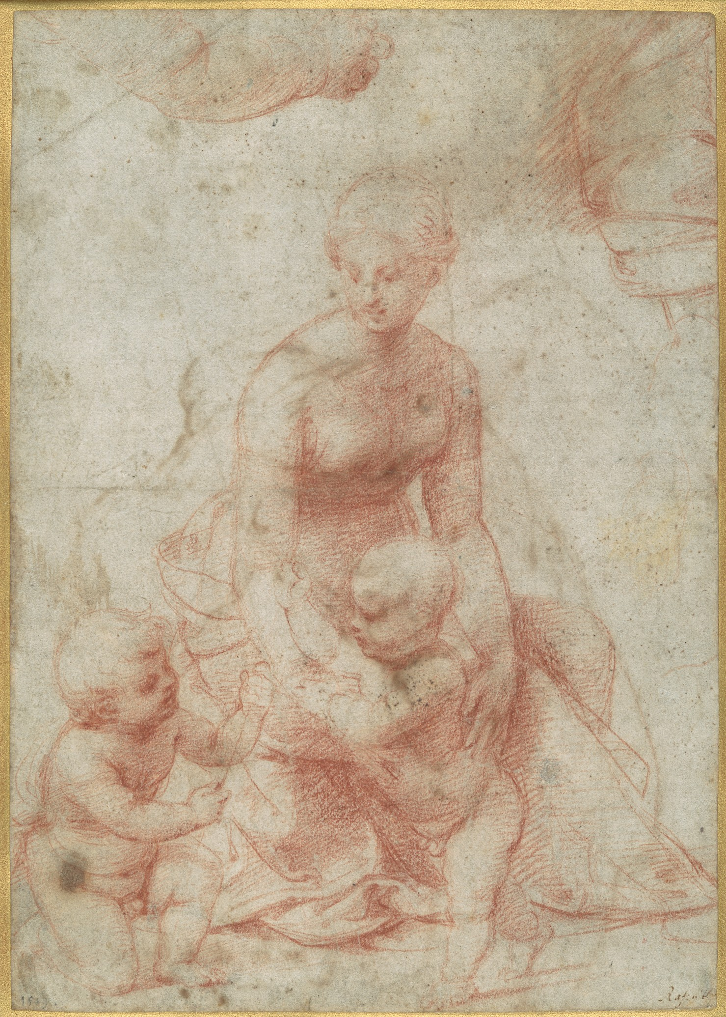 Drawing; Drawings